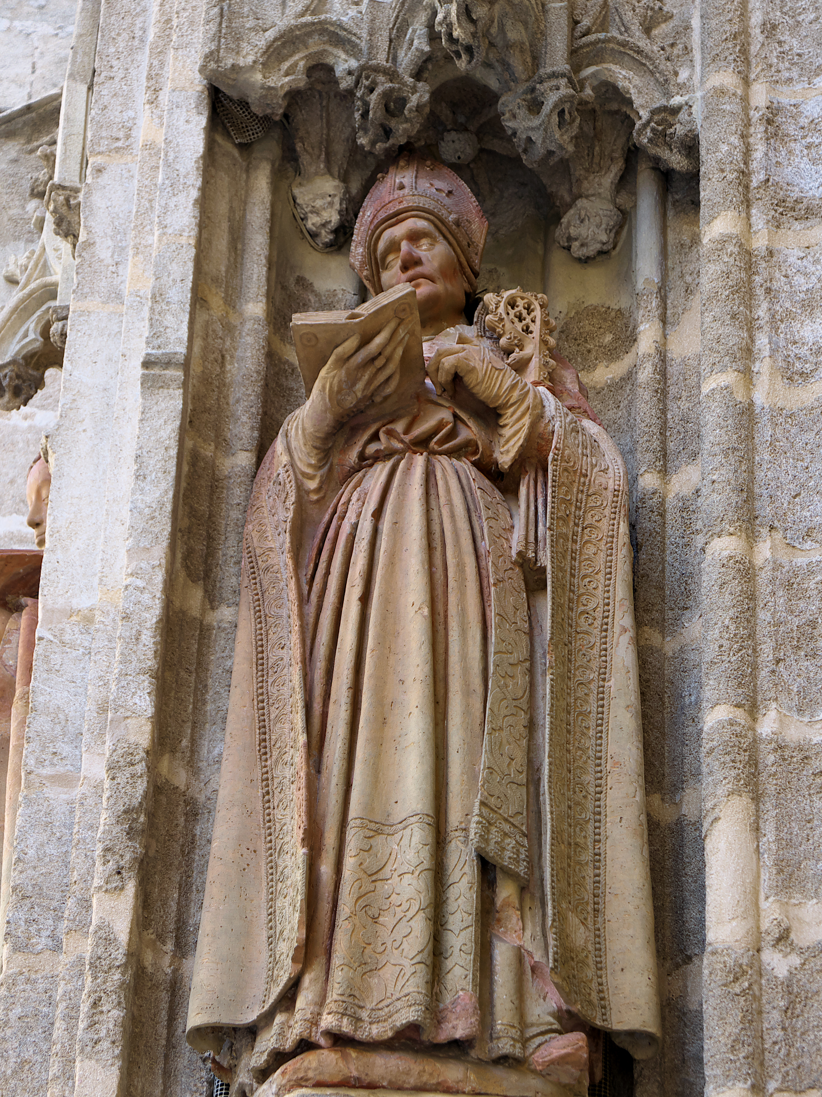 Portada del Bautismo de la Catedral de Sevilla. Lorenzo Mercadante de Bretaña talla en barro cocido a las importantes figuras de la iglesia sevillana, con San Fulgencio, sus hermanos San Isidoro, San Leandro y Santa Florentina.